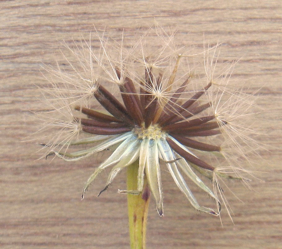 zelfgemaakte foto van Kleinstreepzaad rijp bloemhoofdje; half september